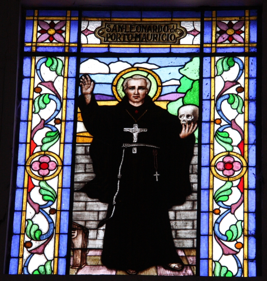 Templo del Hospital, Acámbaro, Estado de Guanajuato, México